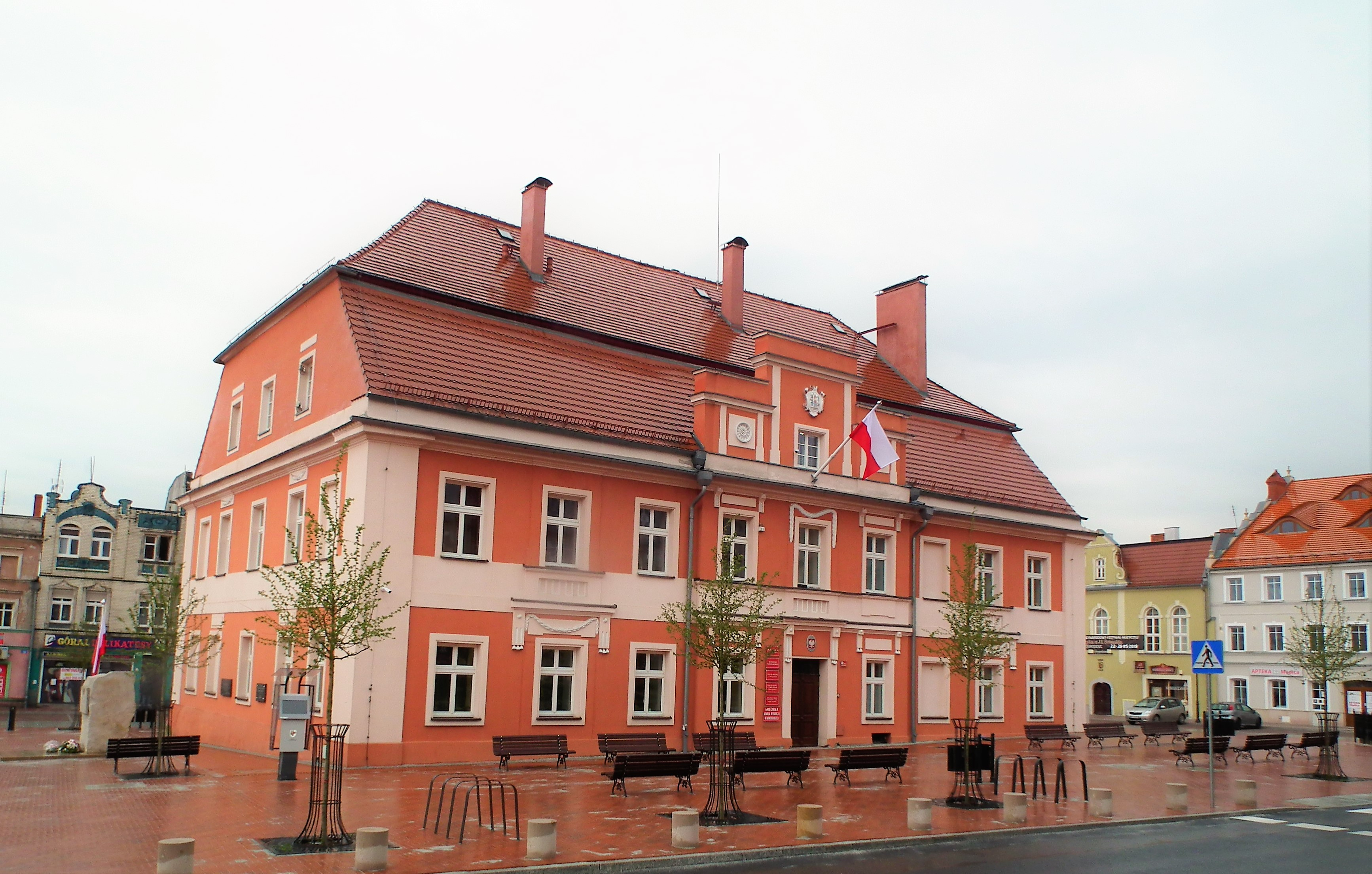 Ratusz w Nowogrodźcu w 2019 r.